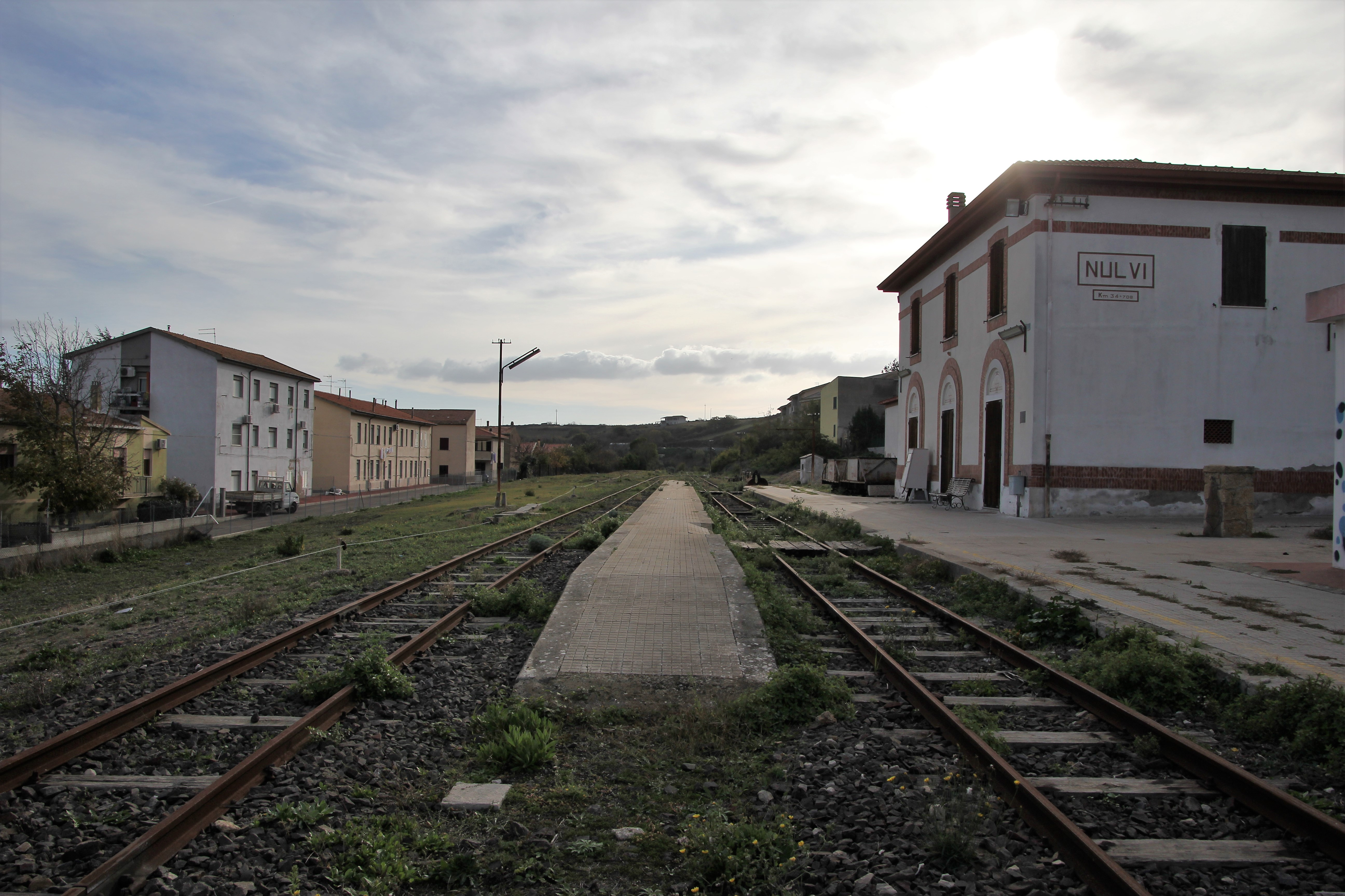 Nulvi, stazione ferroviaria